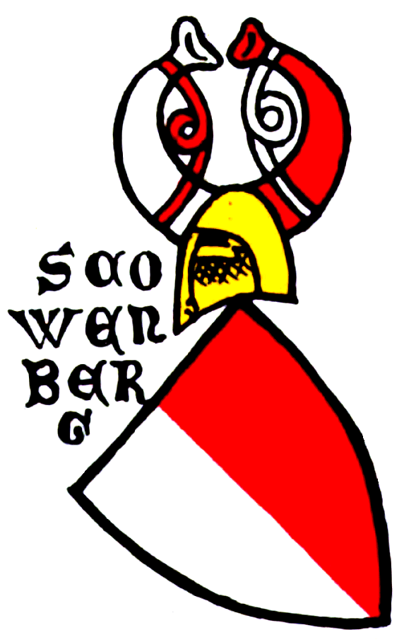 Wappen der Scowenberg (Schauenberg, Schweiz))